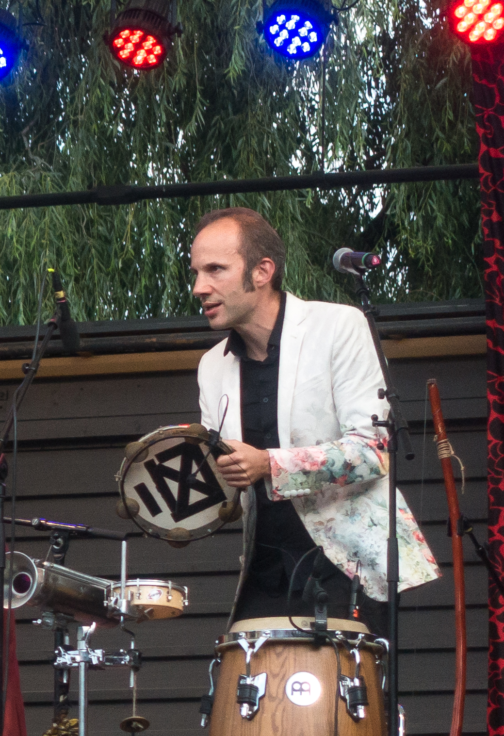 Finn Björnulfsson med Miriam Aida under ett gigg i Kungsträdgården (MELANGEFEST Stallet@Kungsan) i Stockholm den 23 augusti 2019.